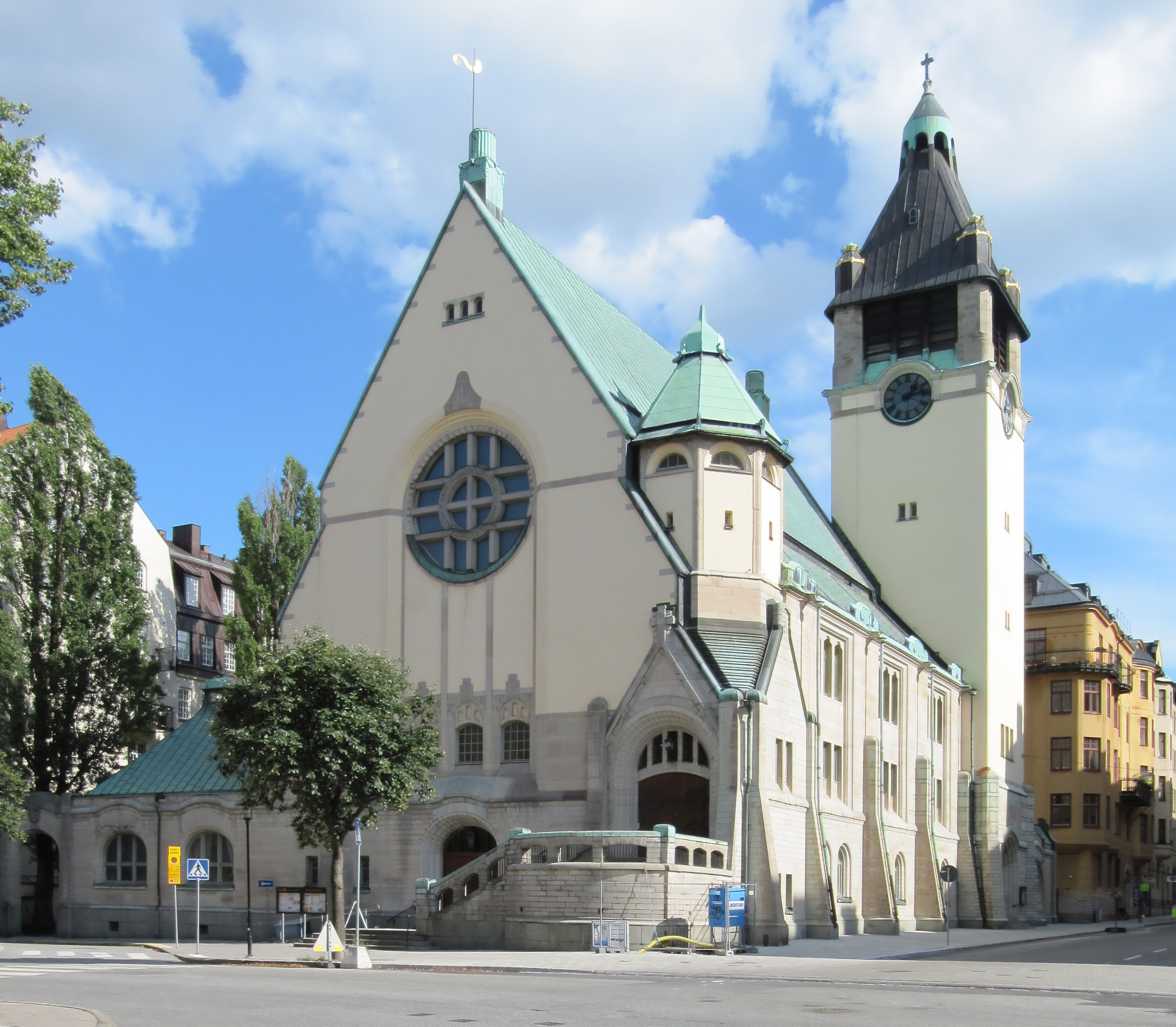 S:t Matteus kyrka från nordväst